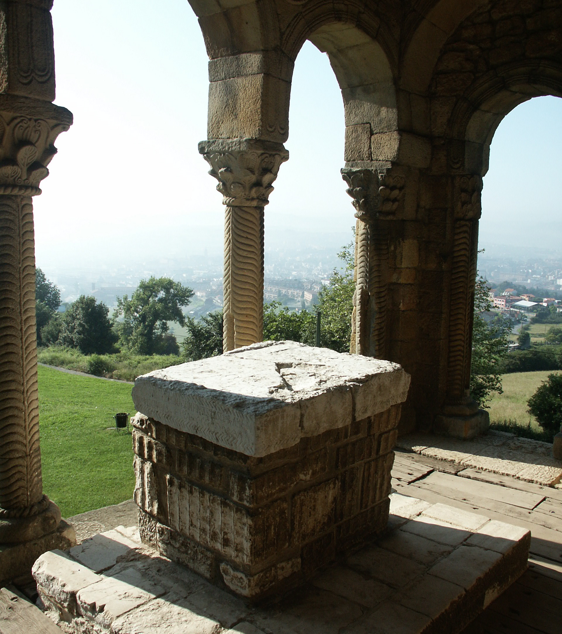 Altar Santa Maria del Naranco in der östlichen Loggia